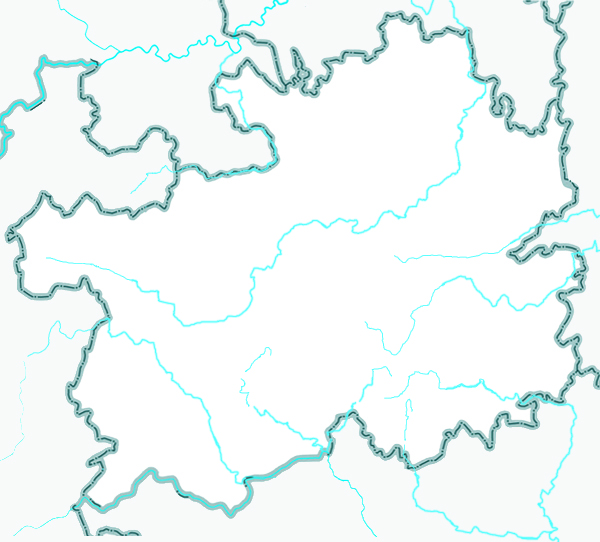 中国贵州省地图，数据来源于中国国家测绘地理信息局[1]，水系数据参考《中国河湖大典》之《长江卷》和《珠江卷》：